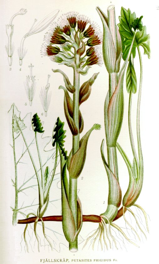 Fjällskråp (Petasites frigidus) 1. växtens underjordsstam med grova vattenrötter och till vänster en bladskiva, sedd från undersidan 2. övre delen av ett övervägande hanligt individ 3. detsammas mittblomma 4. dess kantblomma (båda 4/1) 5. den honliga korgens mittblomma 6. densammas kantblomma (båda 4/1)